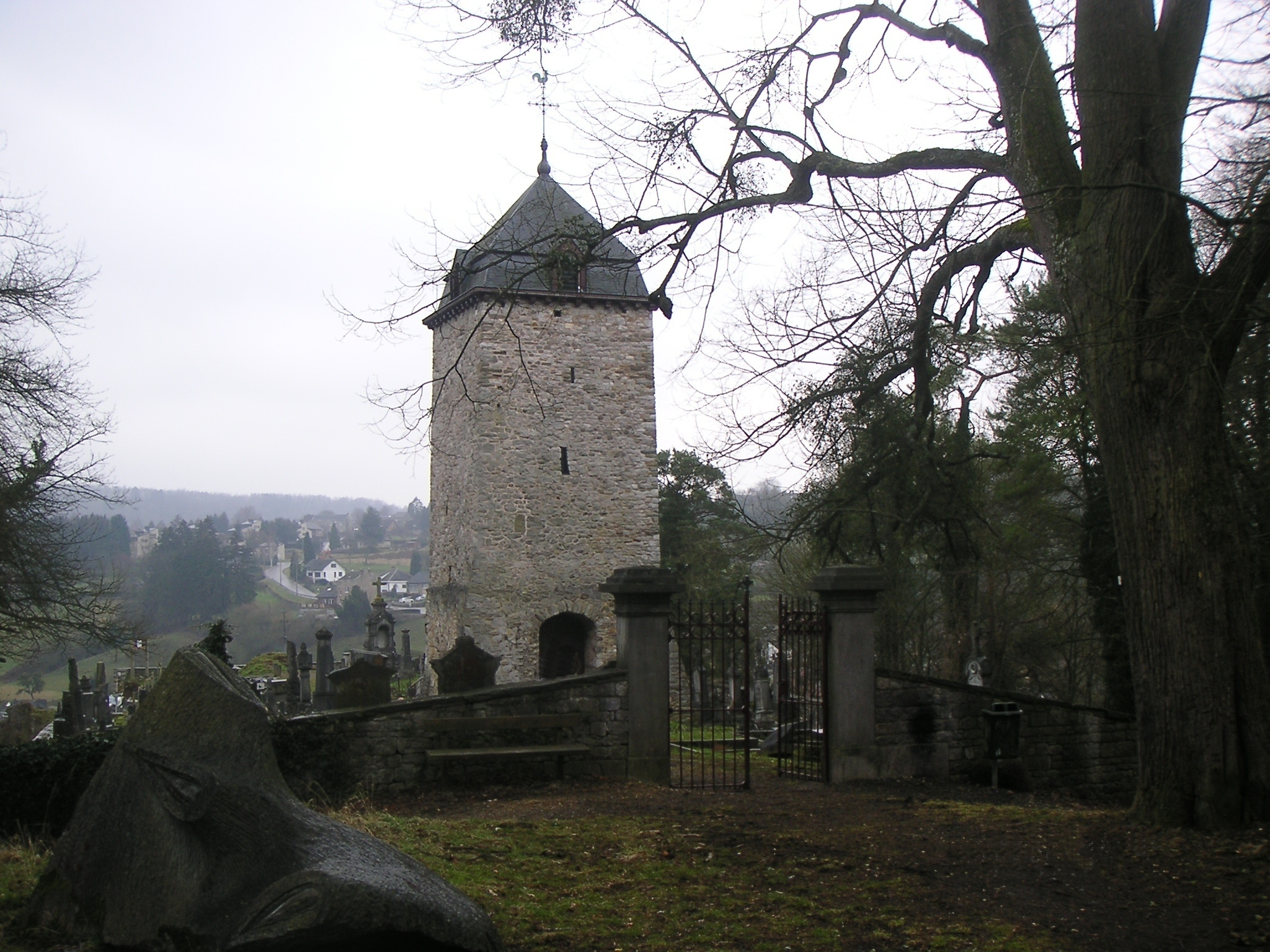 Tour Saint-Martin et le cimetière, Comblain-au-Pont, Belgium